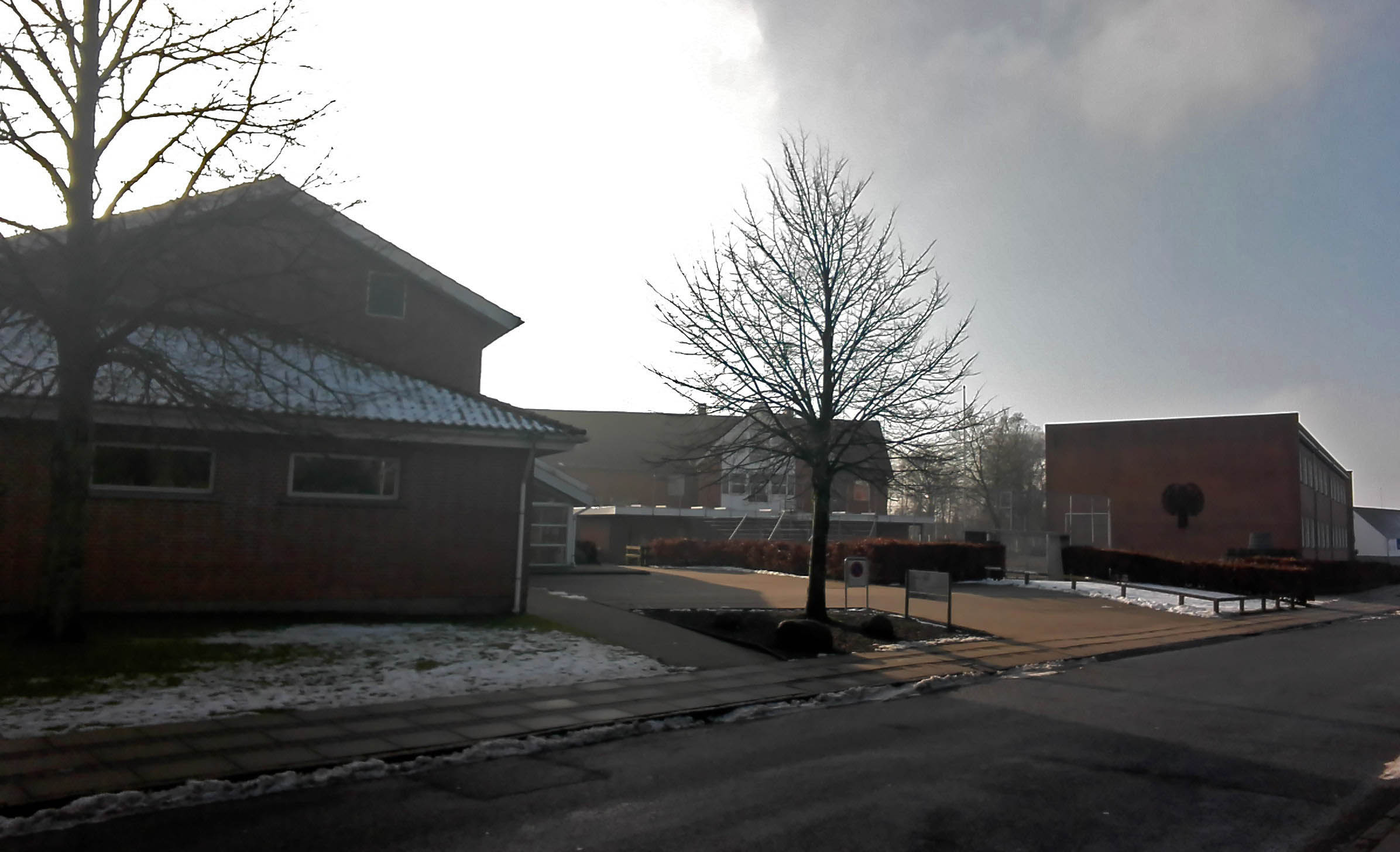 Vamdrup Skoles afdeling for 3.-9. aldersklasse